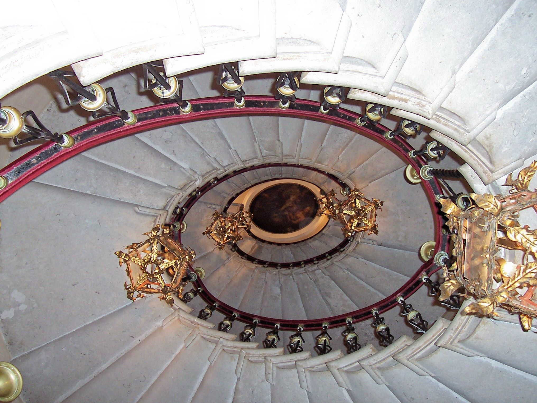 Scala ovata di Andrea Palladio nel Castello di Duino